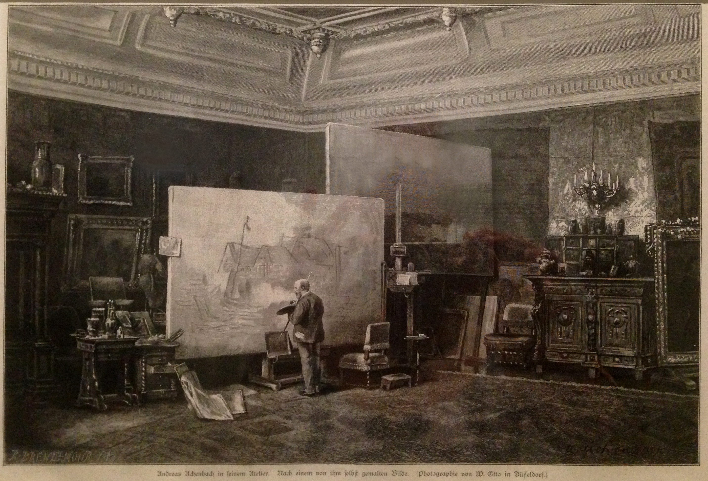 Andreas Achenbach in seinem Atelier, Holzstich Brend'amour Düsseldorf nach Foto von Wilhelm Otto Düsseldorf von Athenbachs selbst gemalten Bild (wurde in der "Illustrirten Zeitung", vom 26. Sept. 1885 abgebildet)